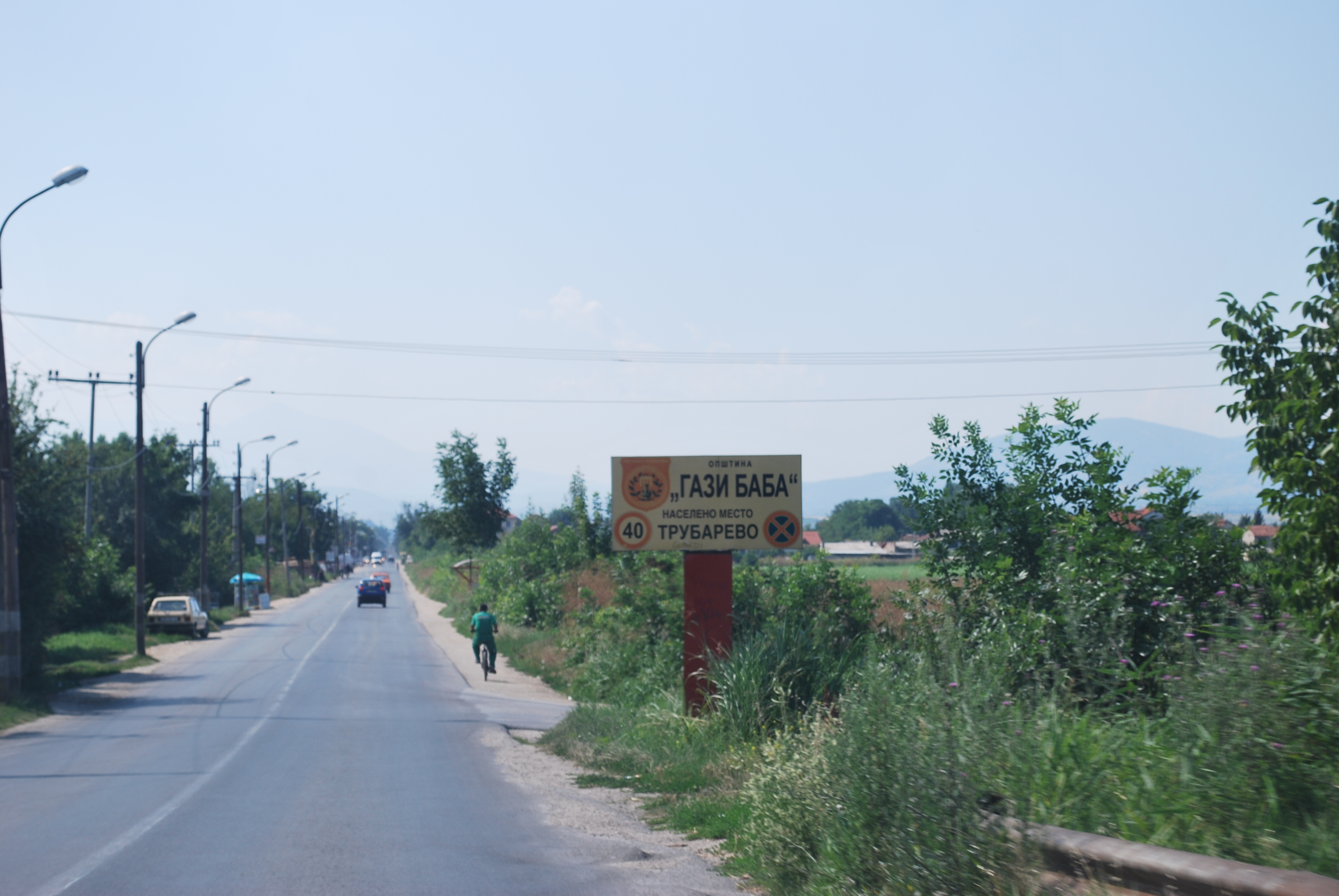 Trubarevo